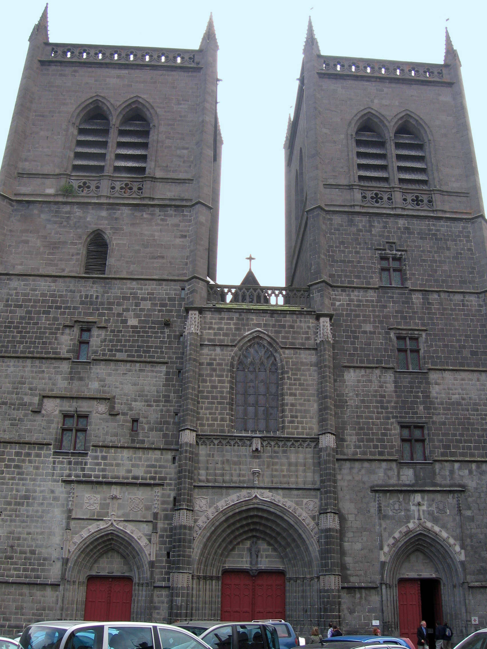 La cathédrale de Saint Flourvue de face